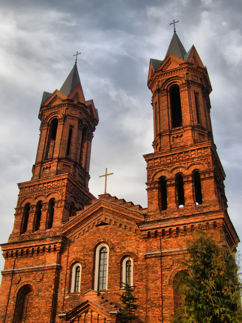 Построен в 1785 году. В конце 19 века значительно перестроен (арх. В. Пиотровский). Закрыт в 1922. В 1992 году прошёл реставрацию и был открыт для прихожан.